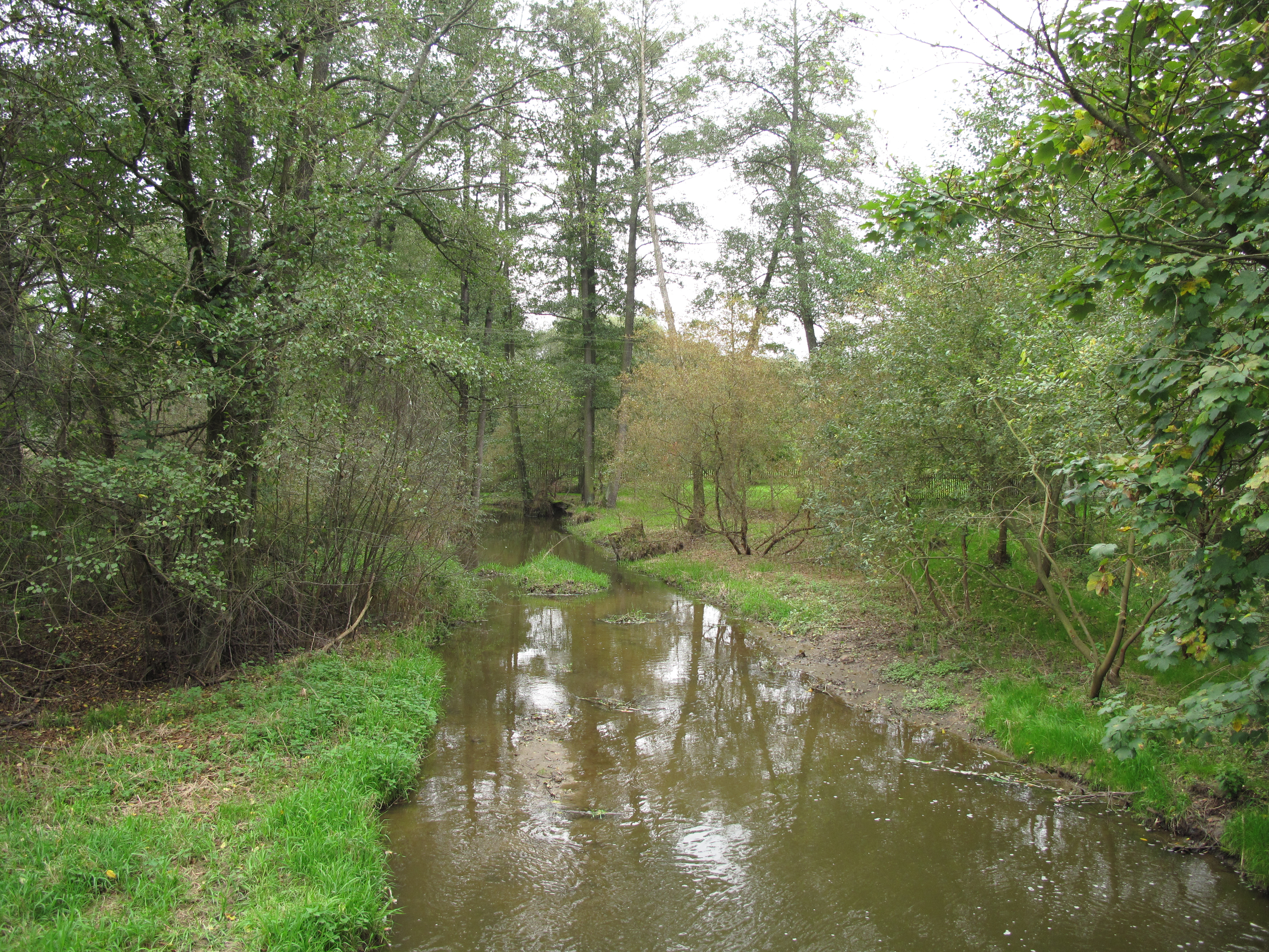 Slupský potok v Záříčí u Mladé Vožice. Okres Tábor, Česká republika.